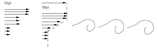 Dans deux fluides superposés ayant des vitesses de développement différentes, on arrive à un cisaillement de la vitesse de déplacement autour de la surface de contact ce qui introduit une instabilite de Kelvin-Helmholtz